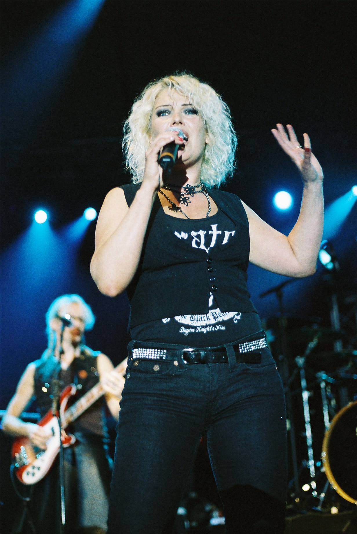 Kim Wilde beim Konzert im Familiengarten Eberswalde